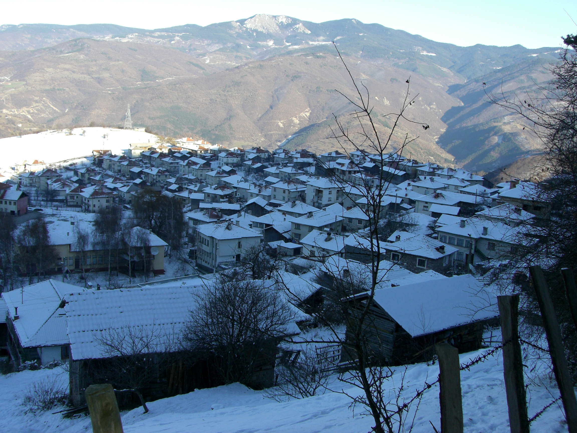 кв. Давидово